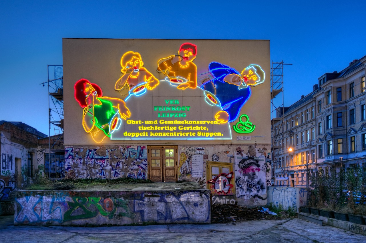 Animierte Neonwerbung Löffelfamilie auf dem Gelände der Feinkost Leipzig, Karl-Liebknecht-Straße.